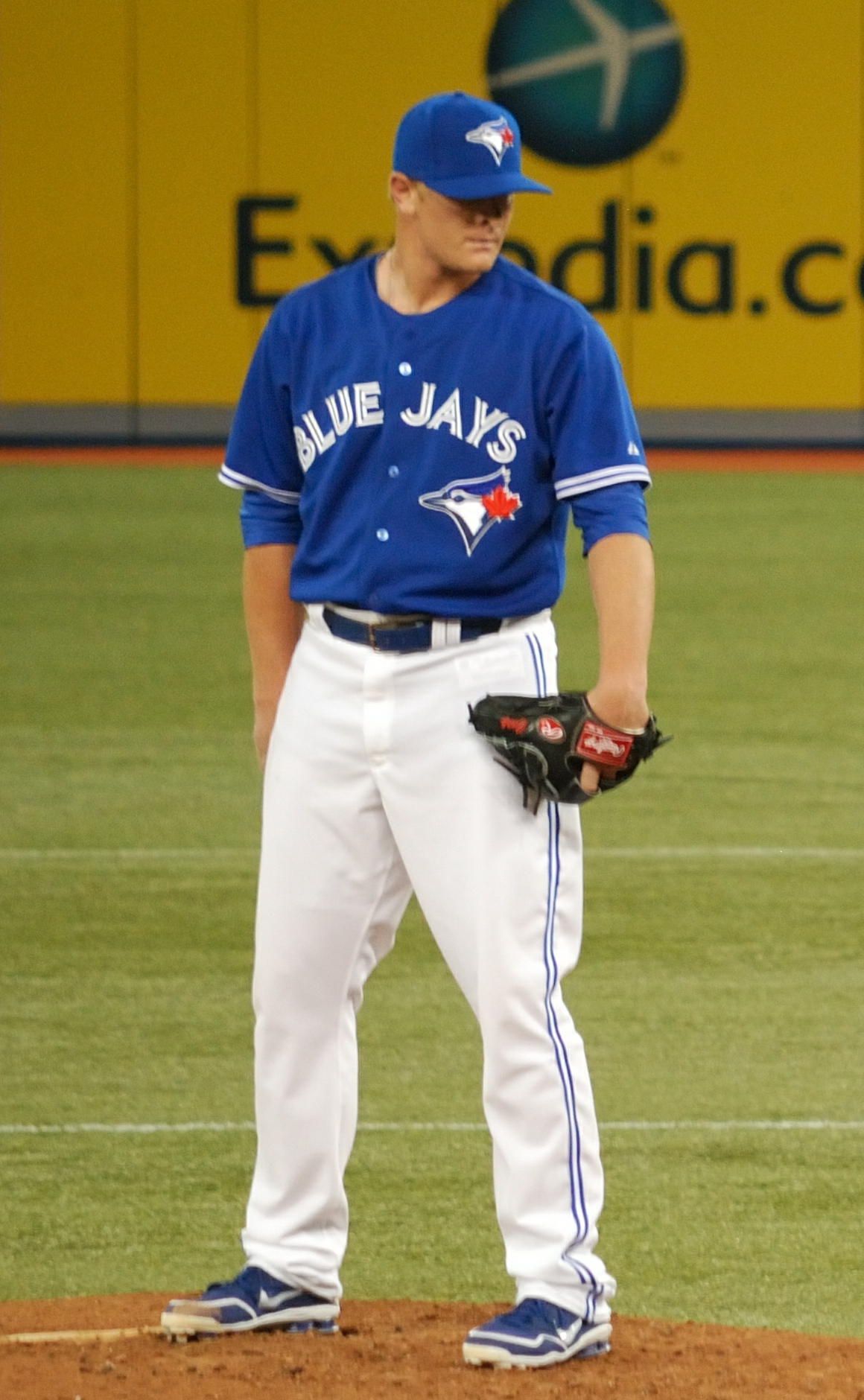 David Carpenter